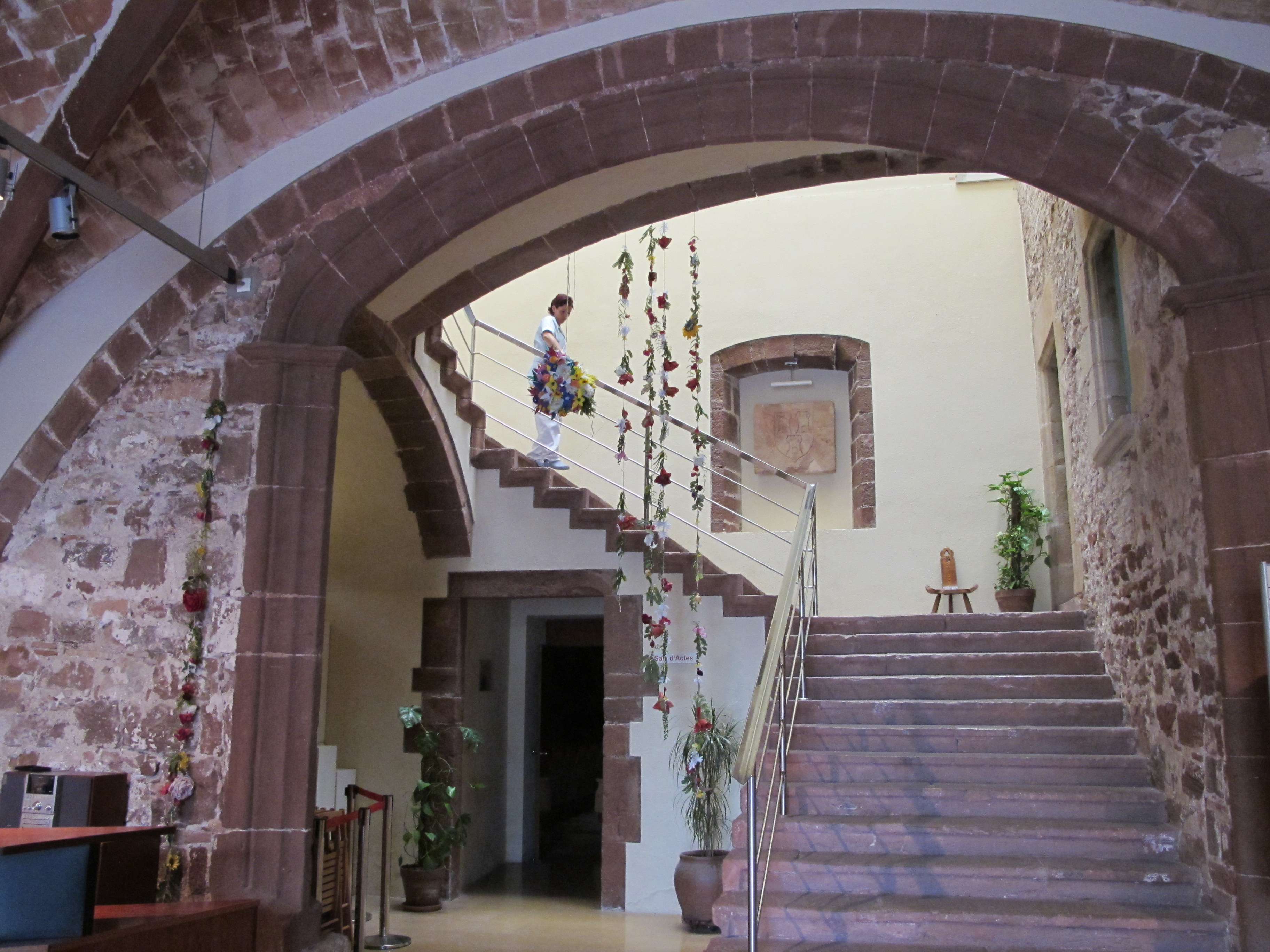 Castell de Pallejà, al Baix Llobregat - Catalunya